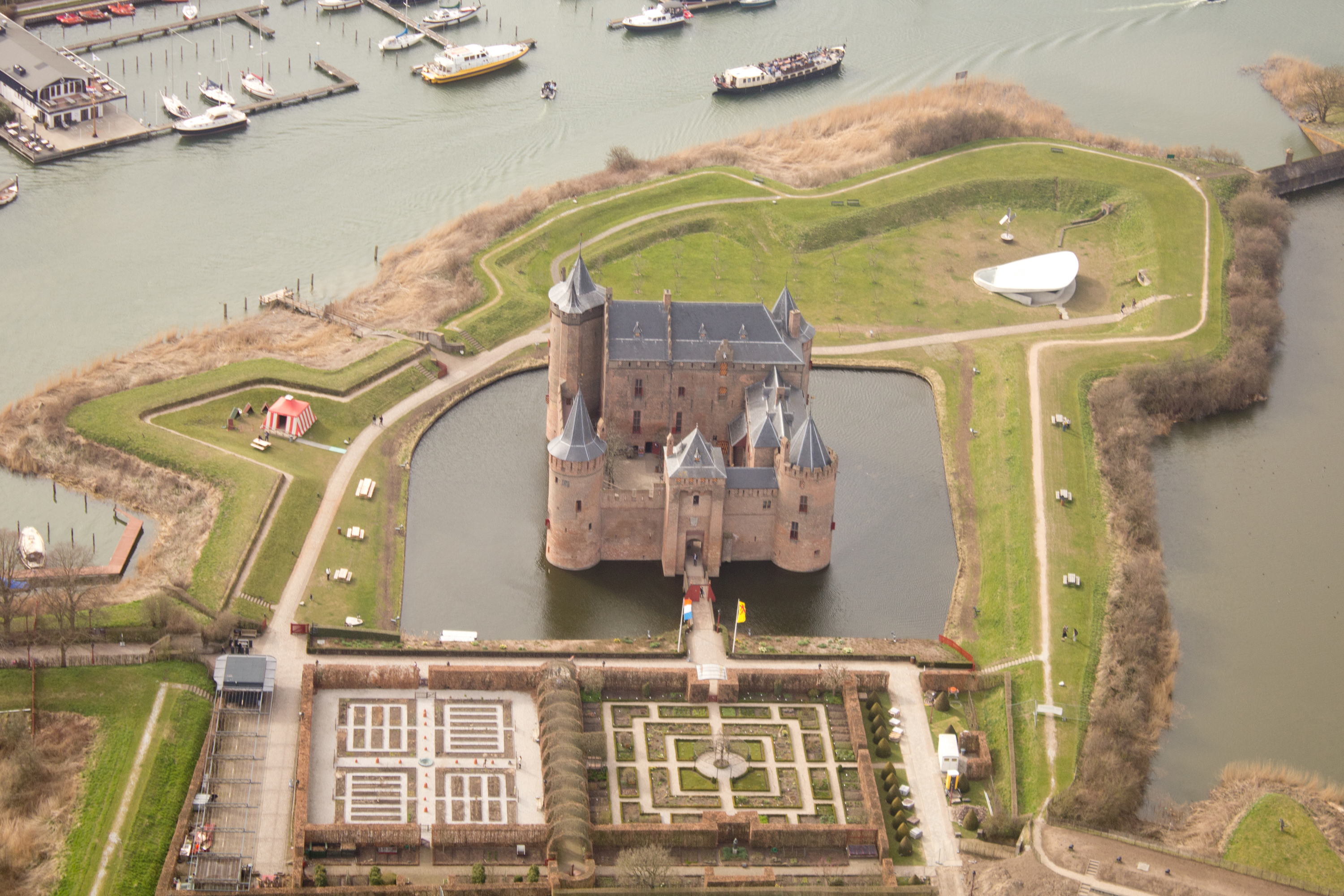 Muiderslot en omwalling, Muiden. Met dank aan Jeroen Komen.